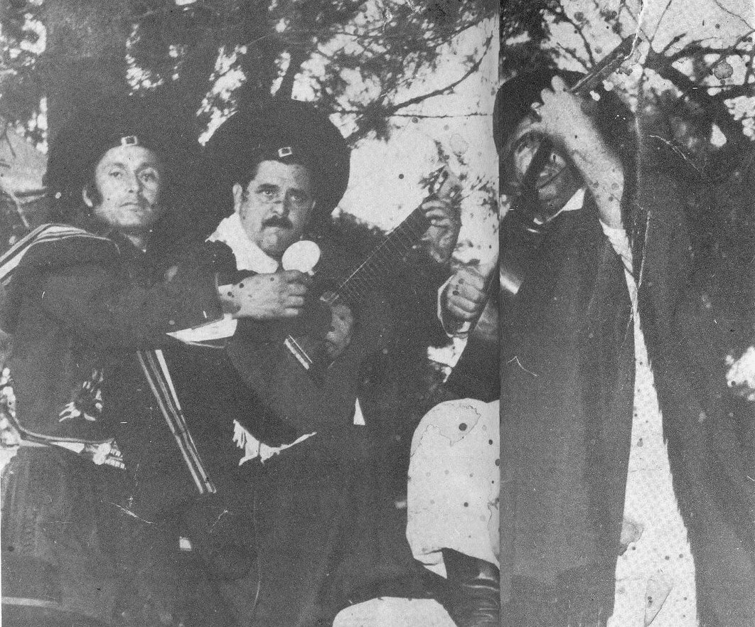 Fotografía de los payadores Carlos Molina (centro), Roberto Bonacina (izquierda) y Juan Carlos Bares "el indio" (derecha), aparecida en la revista argentina "Rincón del Payador" nº4, en setiembre de 1980.